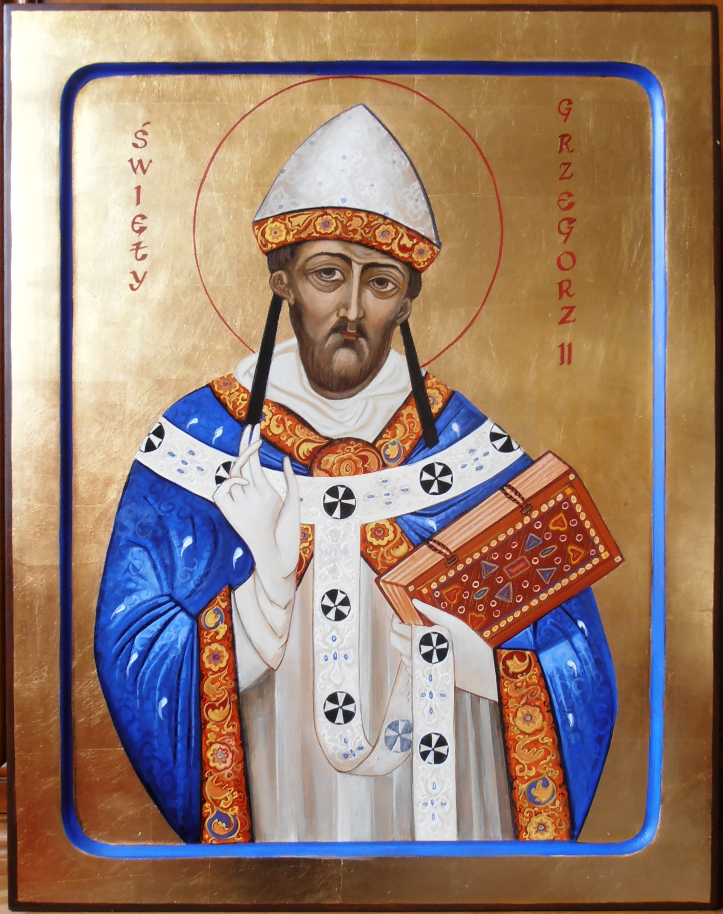 Ikona Papieża Grzegorza II.